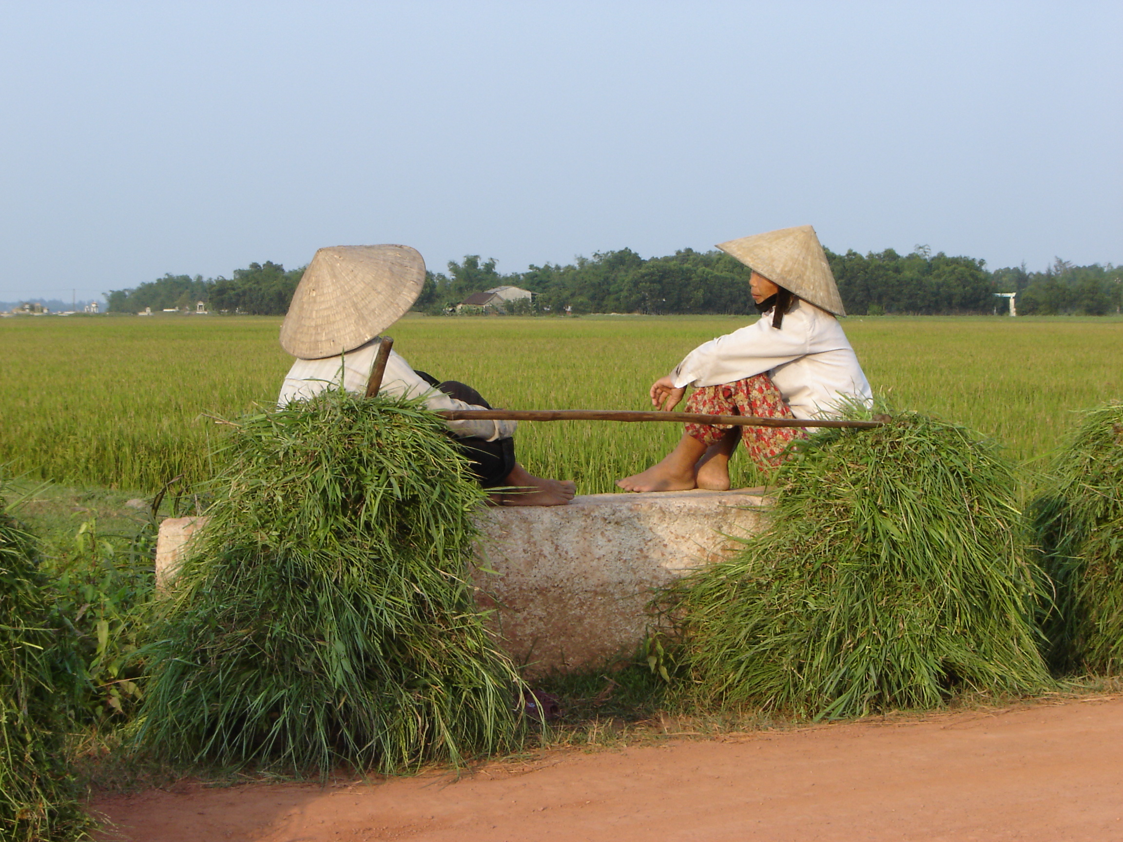 Deux agricultrices au retour des champs de riz province de Thua Thien Hue Vietnam (source: Pierre Ancion)